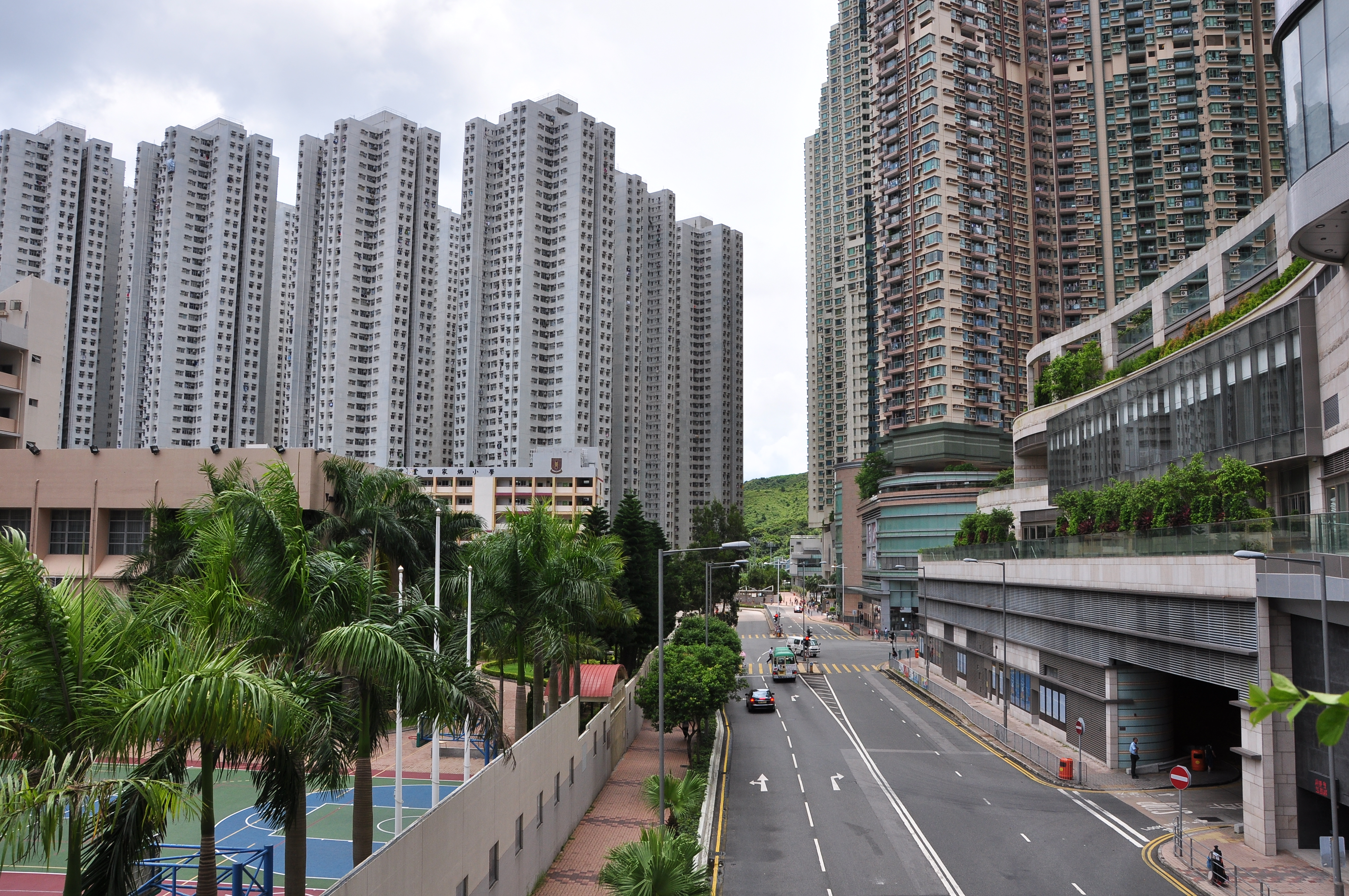 香港將軍澳唐德街東向，道路盡頭為富康花園（左）及將軍澳廣場（右）